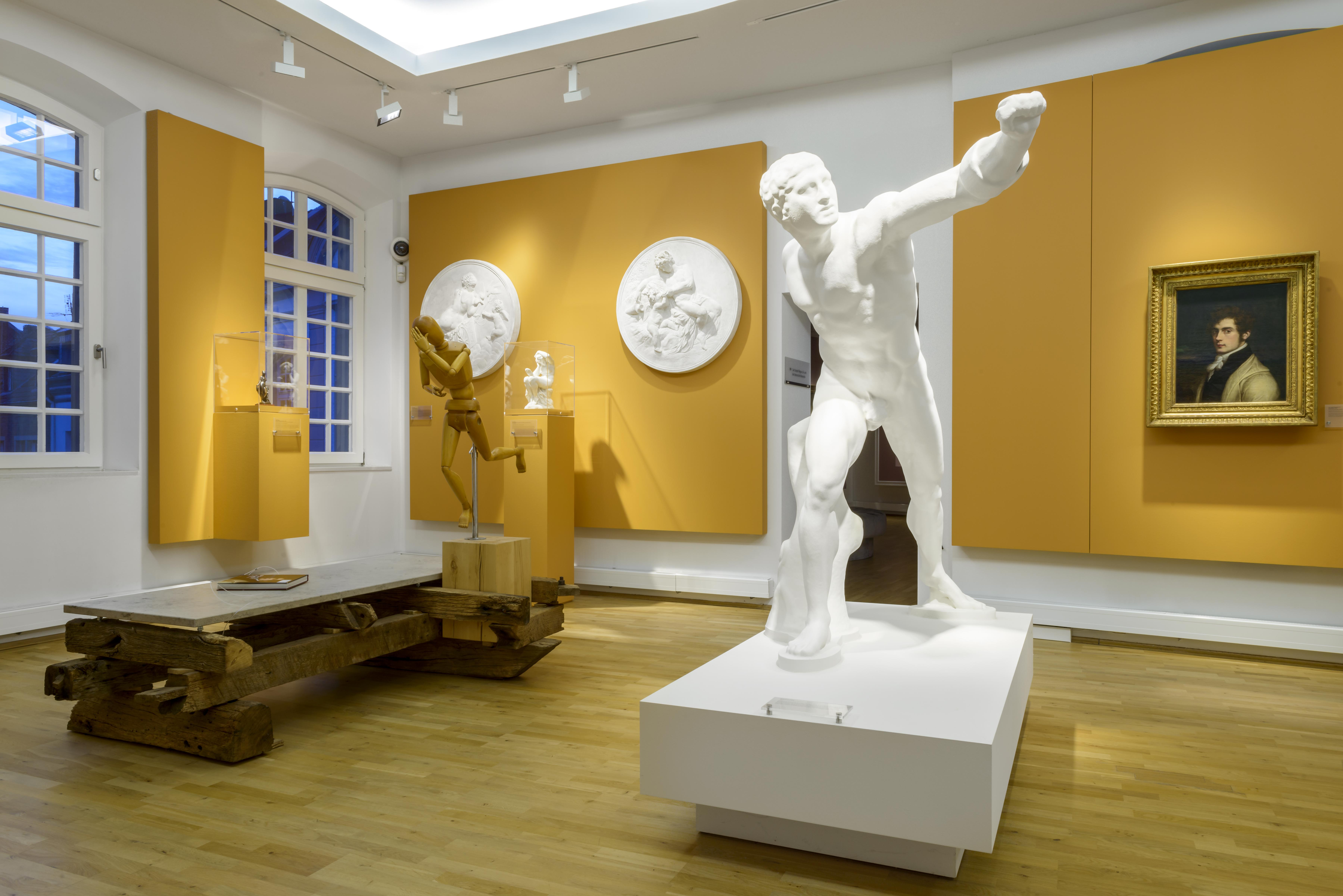 Ein Blick in die Dauerausstellung des Begas Hauses.